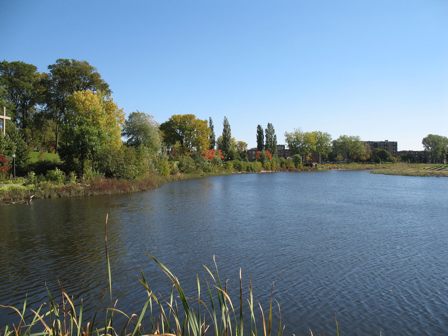 Rivière Saint-Charles à Limoilou, Québec